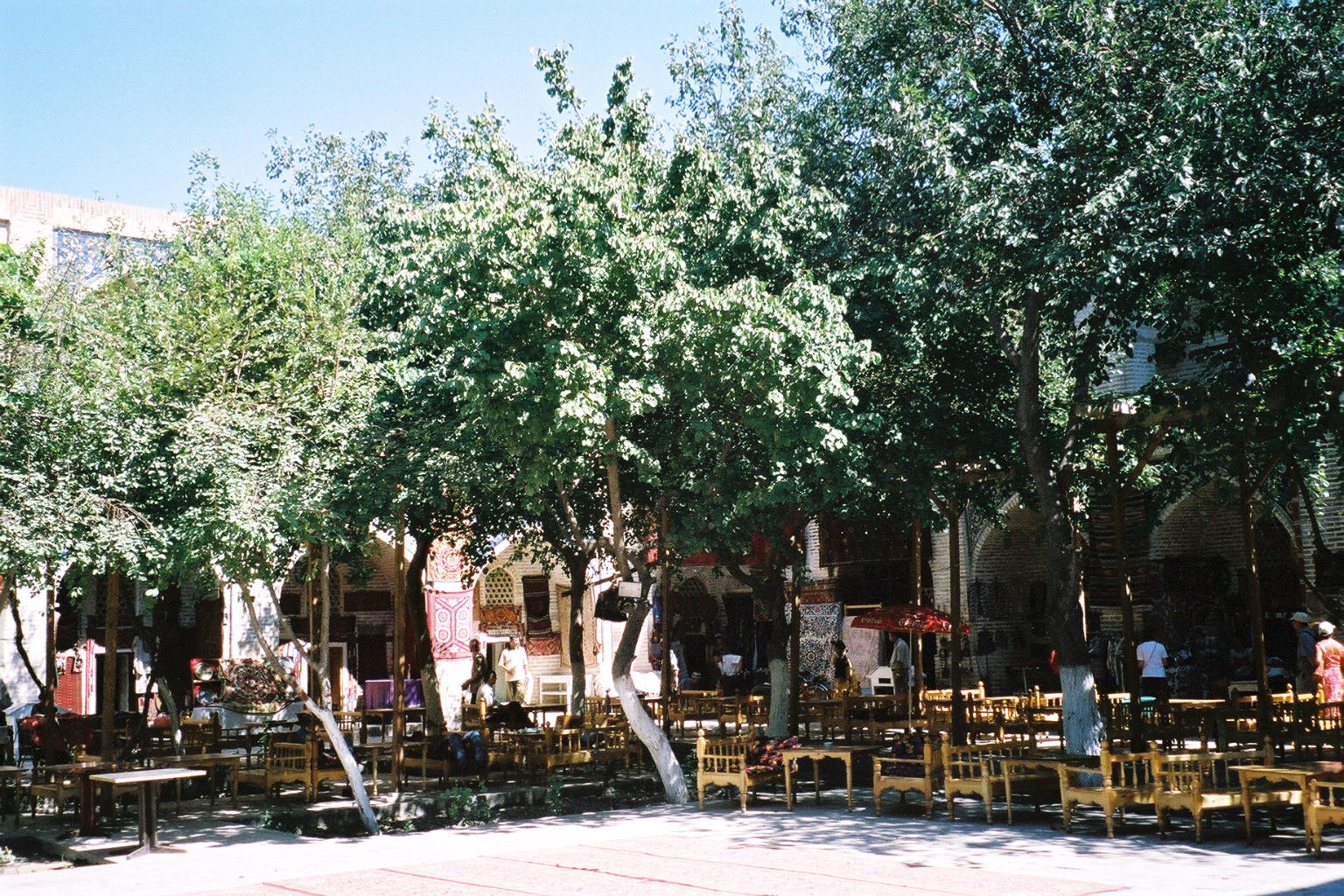 Cours intérieure de la medersa Nadir Divanbegi (XVIIe siècle)